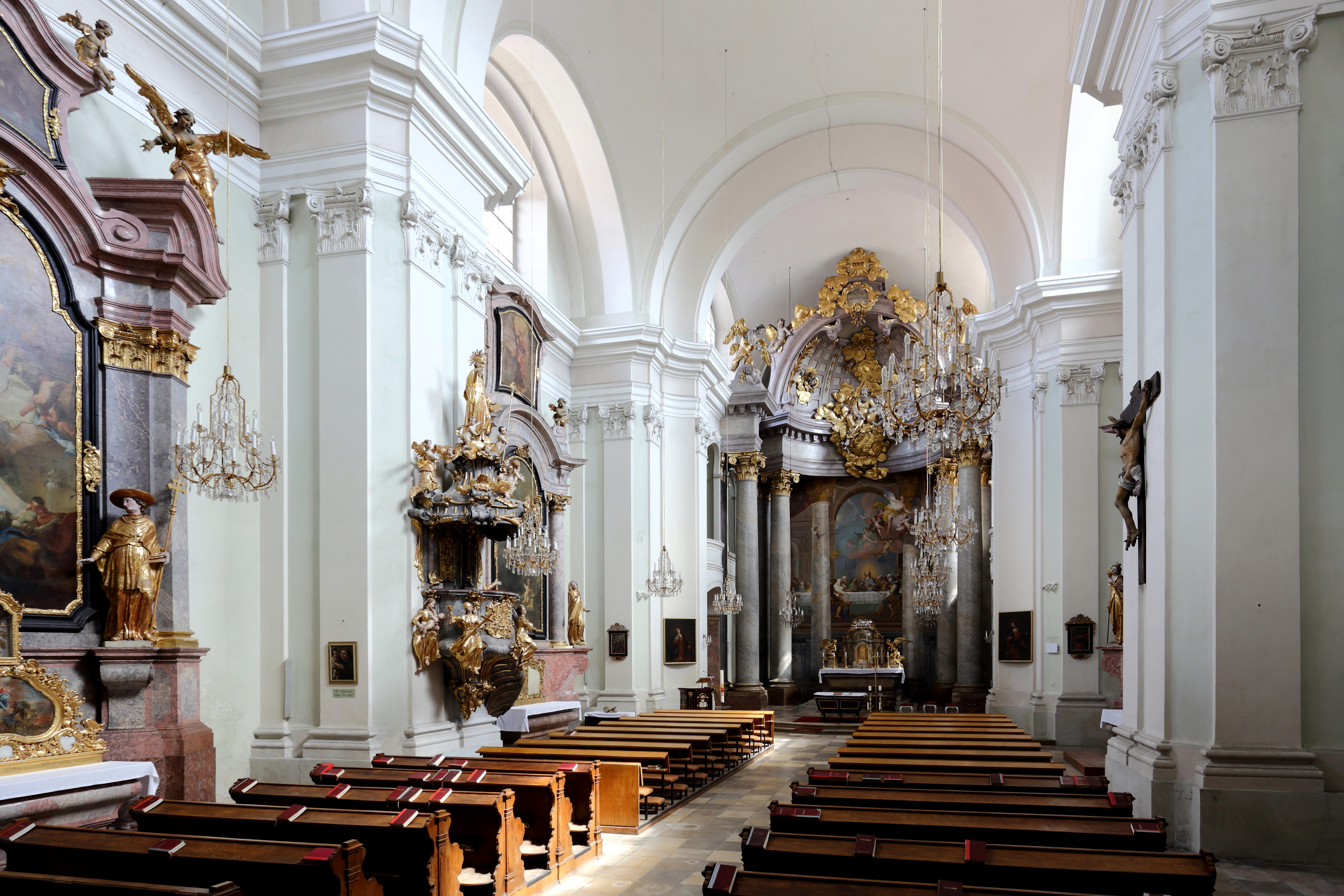 Langhaus und Chor der Augustinerkirche in der niederösterreichischen Stadt Korneuburg.